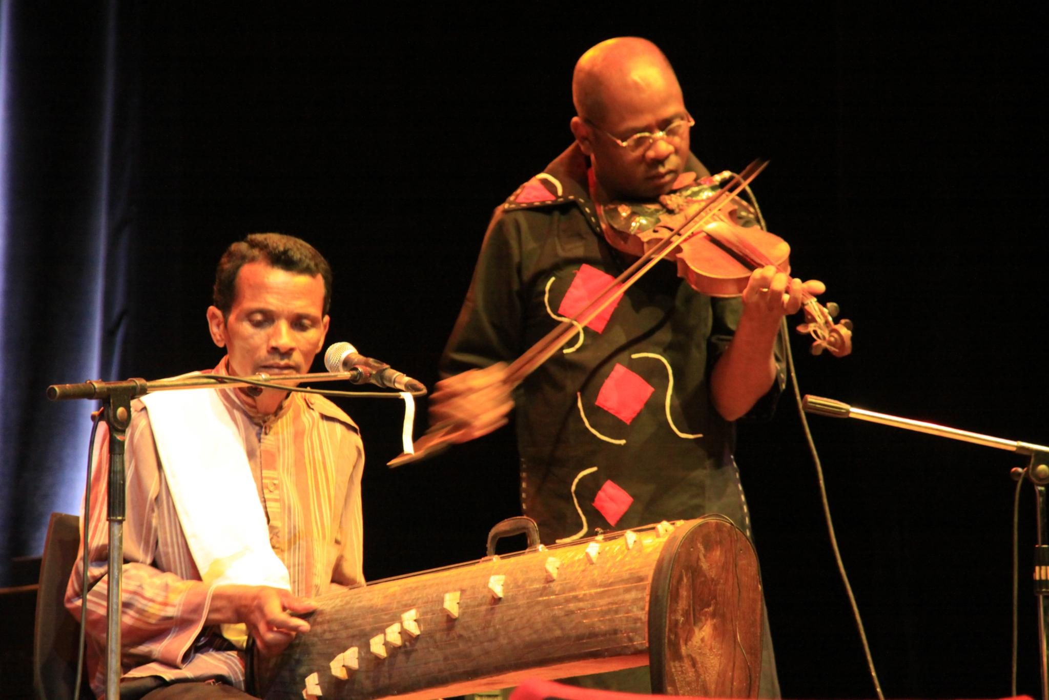 Marovany Trio